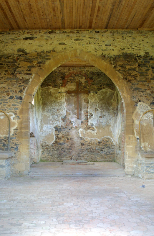 Interiér kostela sv. Petra a Pavla v Dolanech. Pohled od vchodu k presbytáři.